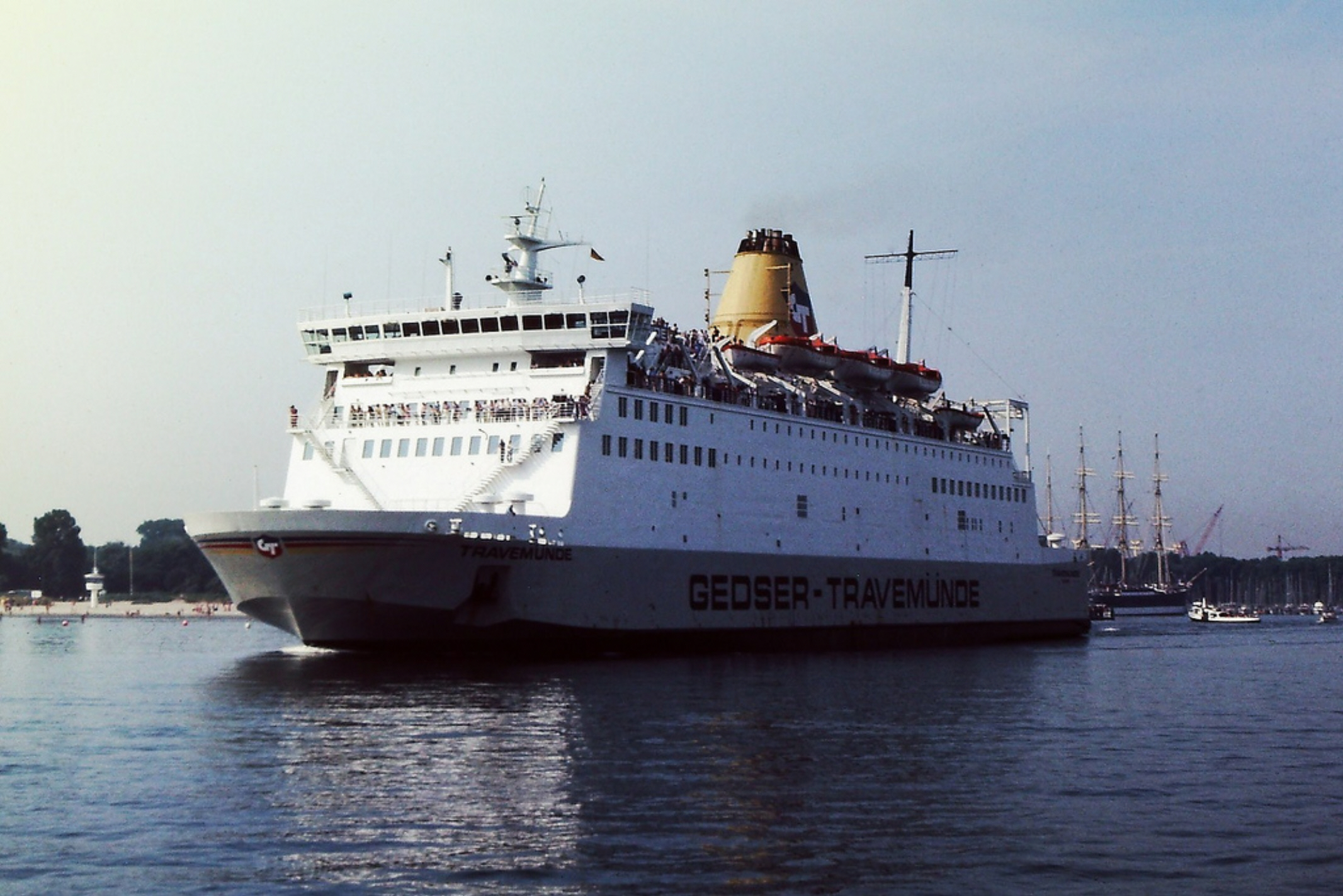 FS Travemünde auf der Gedser-Travemünde-Route, Reederei GT-Link, im Hafen von Travemünde. heute FS Betancuria - Reederei Fred.Olsen Express, Kanarische Inseln)